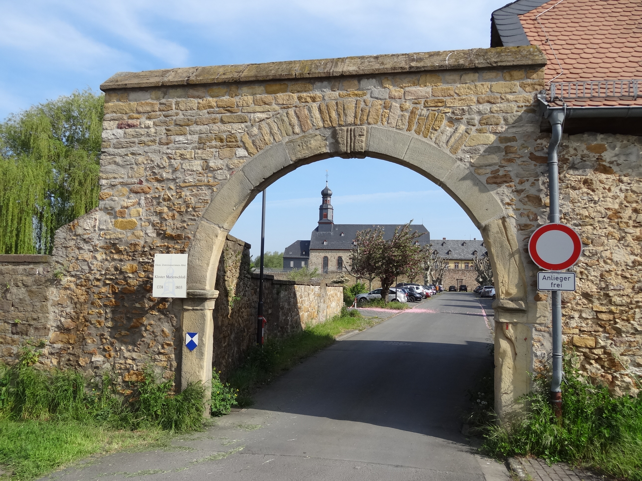 Klosterkirche (JVA Rockenberg)